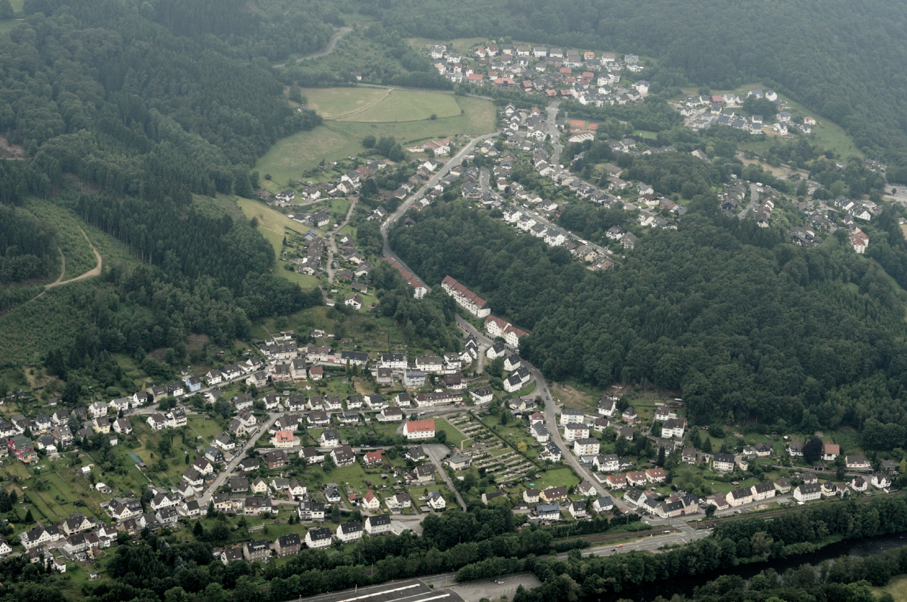 Fotoflug Sauerland Nord. Nachrodt-Wiblingwerde, Ortsteil Einsal mit Wohnplätzen Schmalsgotte und Obstfelderstall, Ruhr-Sieg-Strecke, Bundesstraße 236, Blickrichtung West The making of this document was supported by the Community-Budget of Wikimedia Germany.